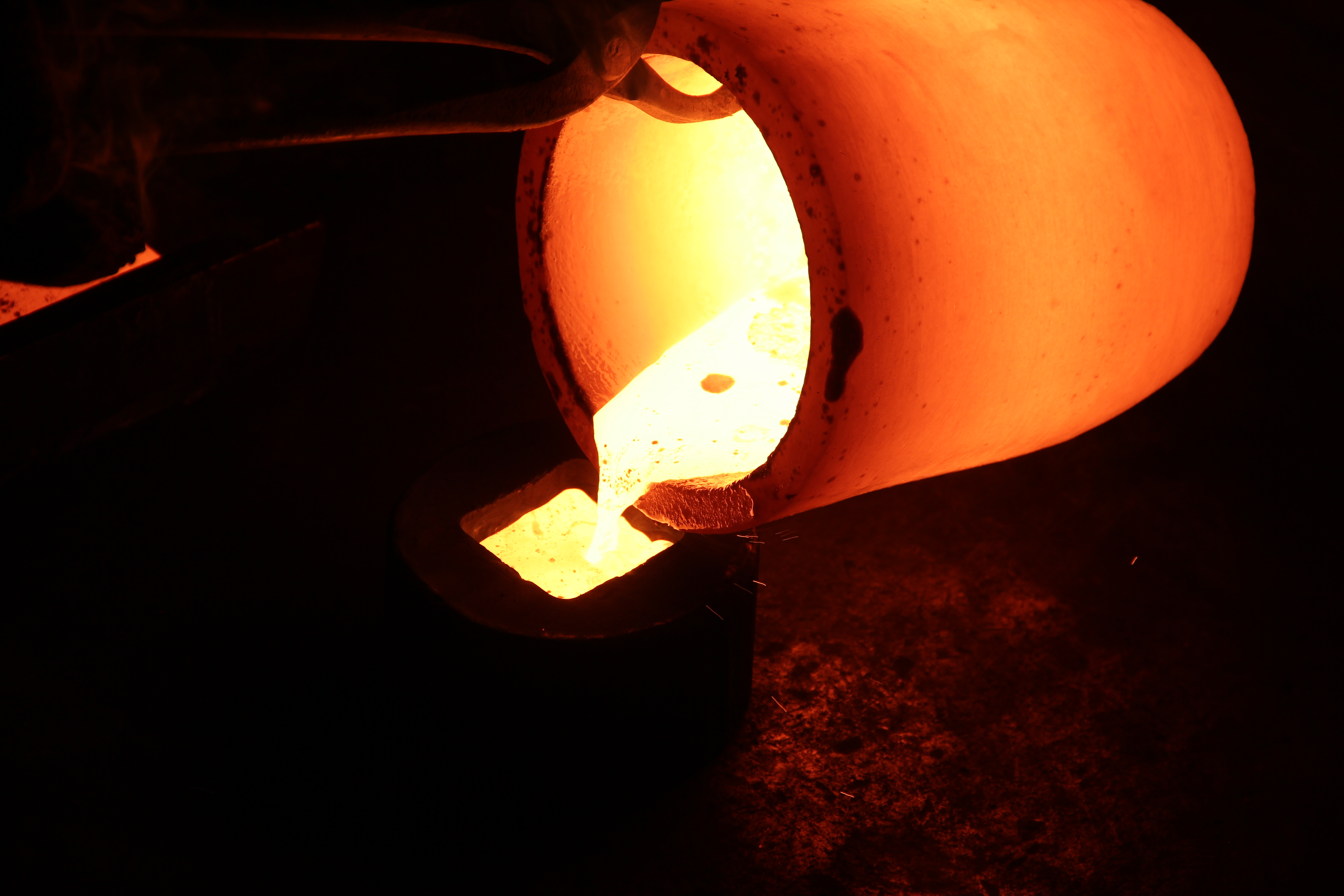 Литейное производство Новосибирского аффинажного завода